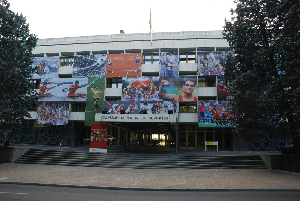 Sede del Consejo Superior de Deportes en la Ciudad Universitaria de Madrid